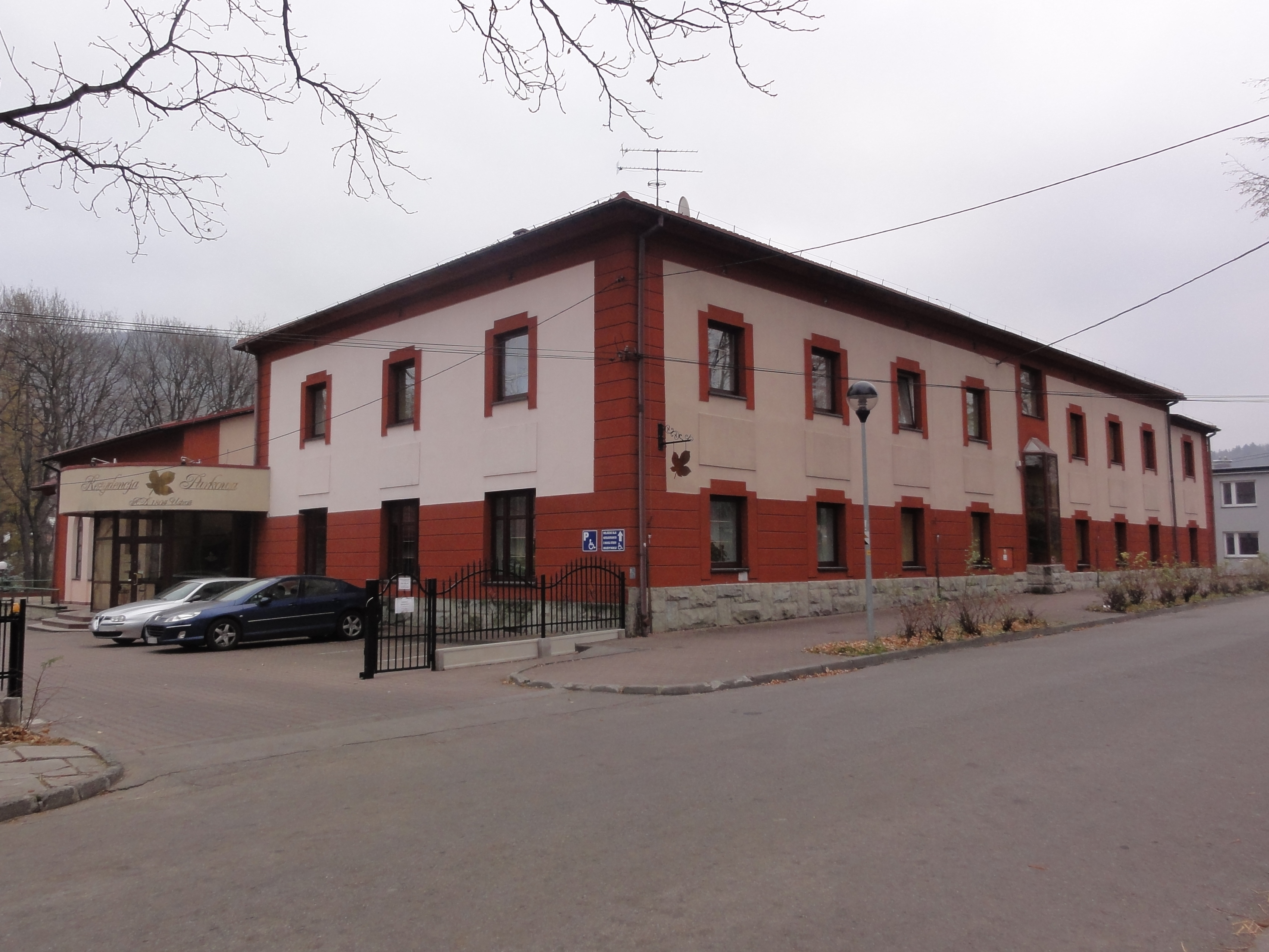 Najstarszy hotel w Ustroniu, ob. "Rezydencja Parkowa"